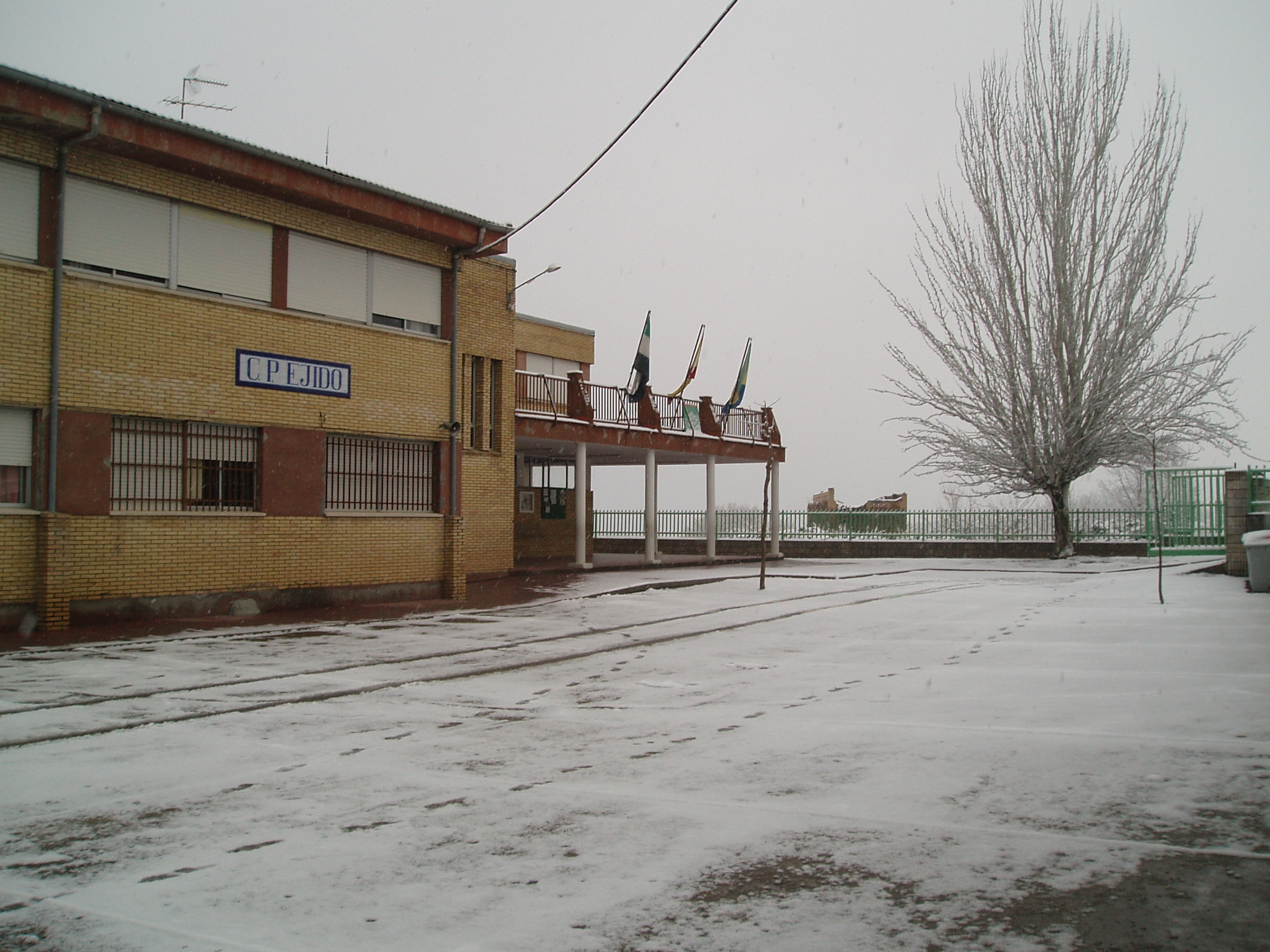 El patio del CP. Ejido